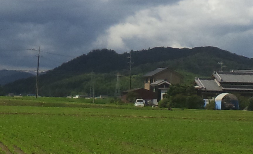 神山 (三重県松阪市)